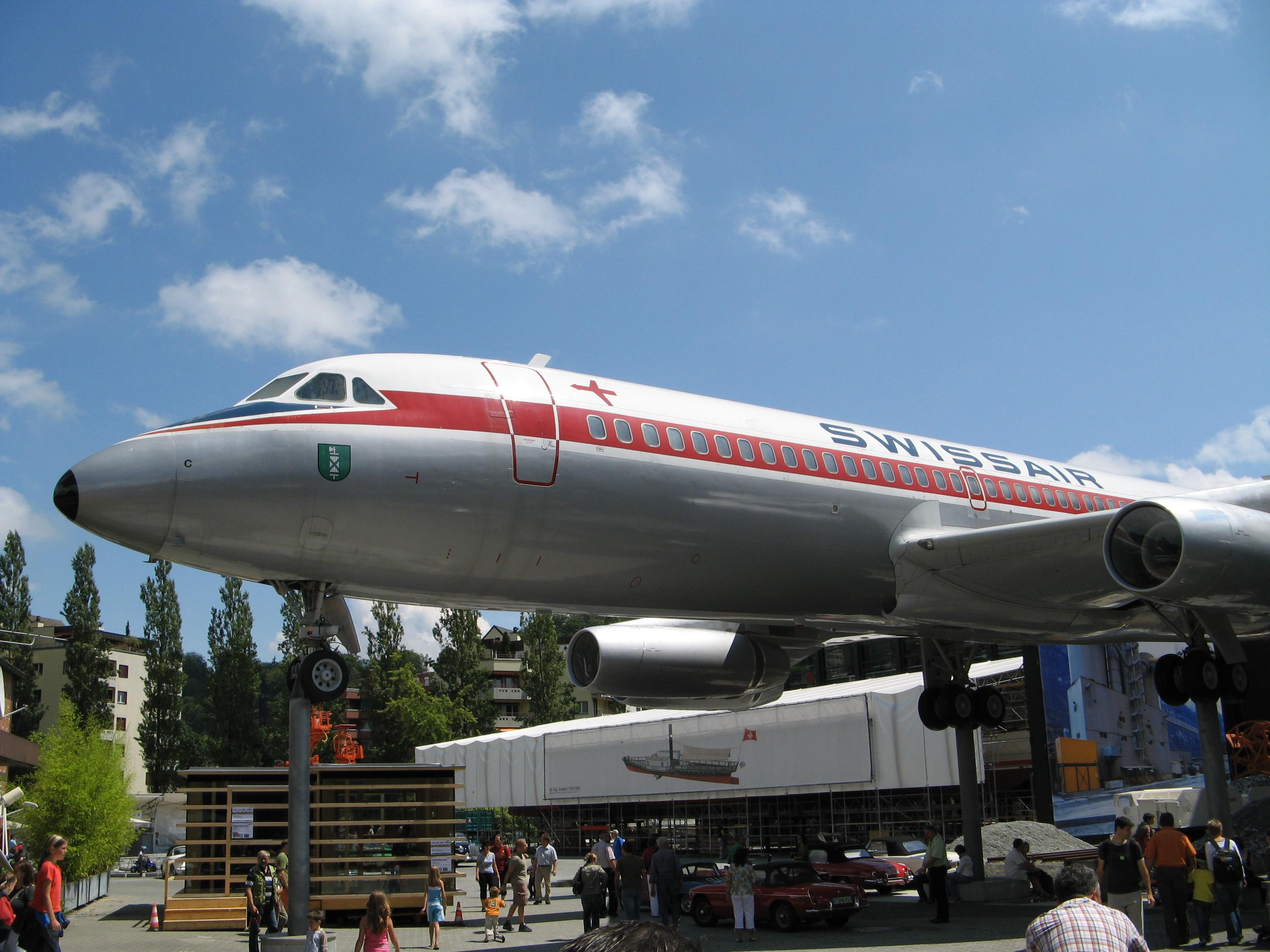 Swiss Transport Museum, Lucerne